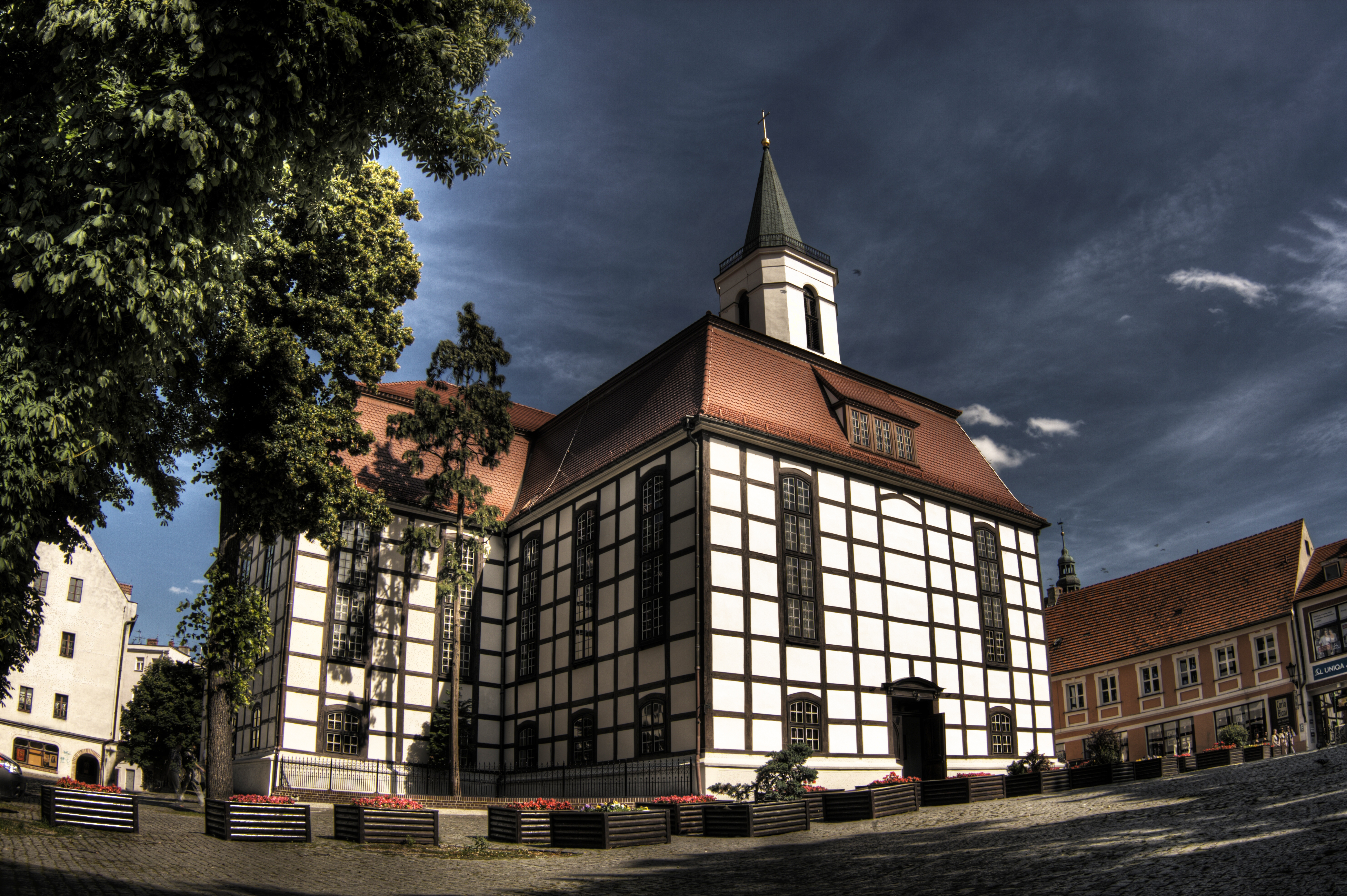 Zielona Góra, kościół ewangelicki, ob. rzym.-kat. par. p.w. Matki Boskiej Częstochowskiej, XVIII